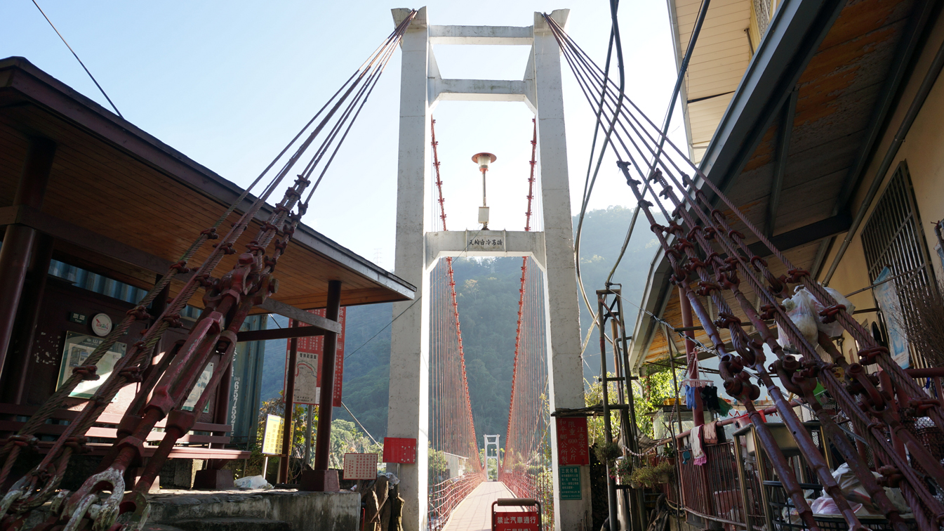 中文（台灣）: 天輪白冷吊橋